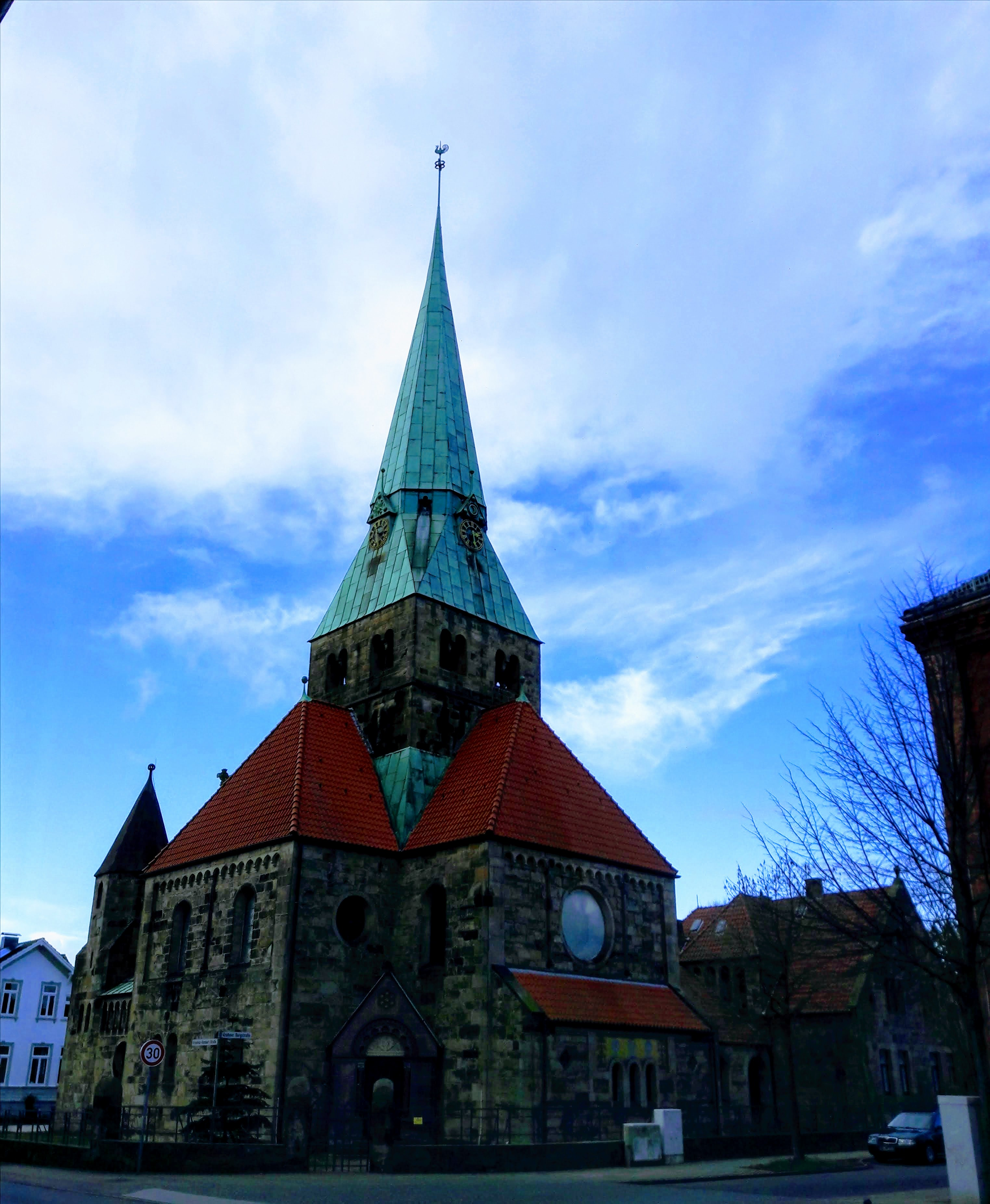 St.-Michael-Kirche Grohn